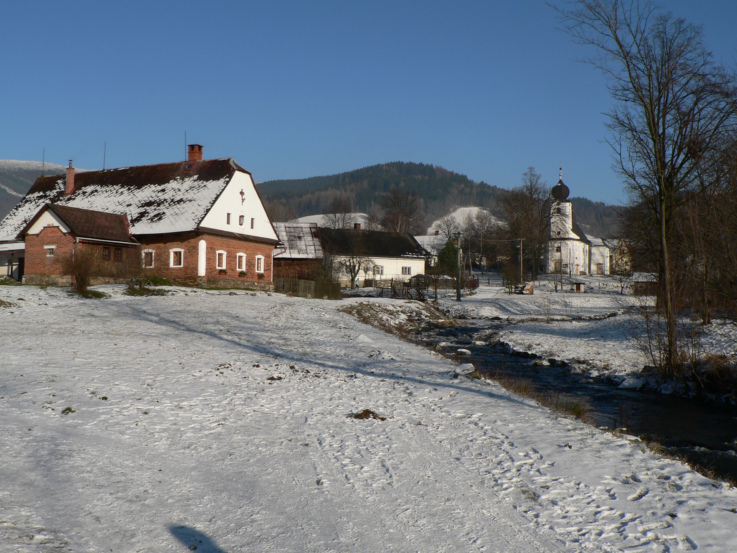 Obec Vernířovice pod kostelem